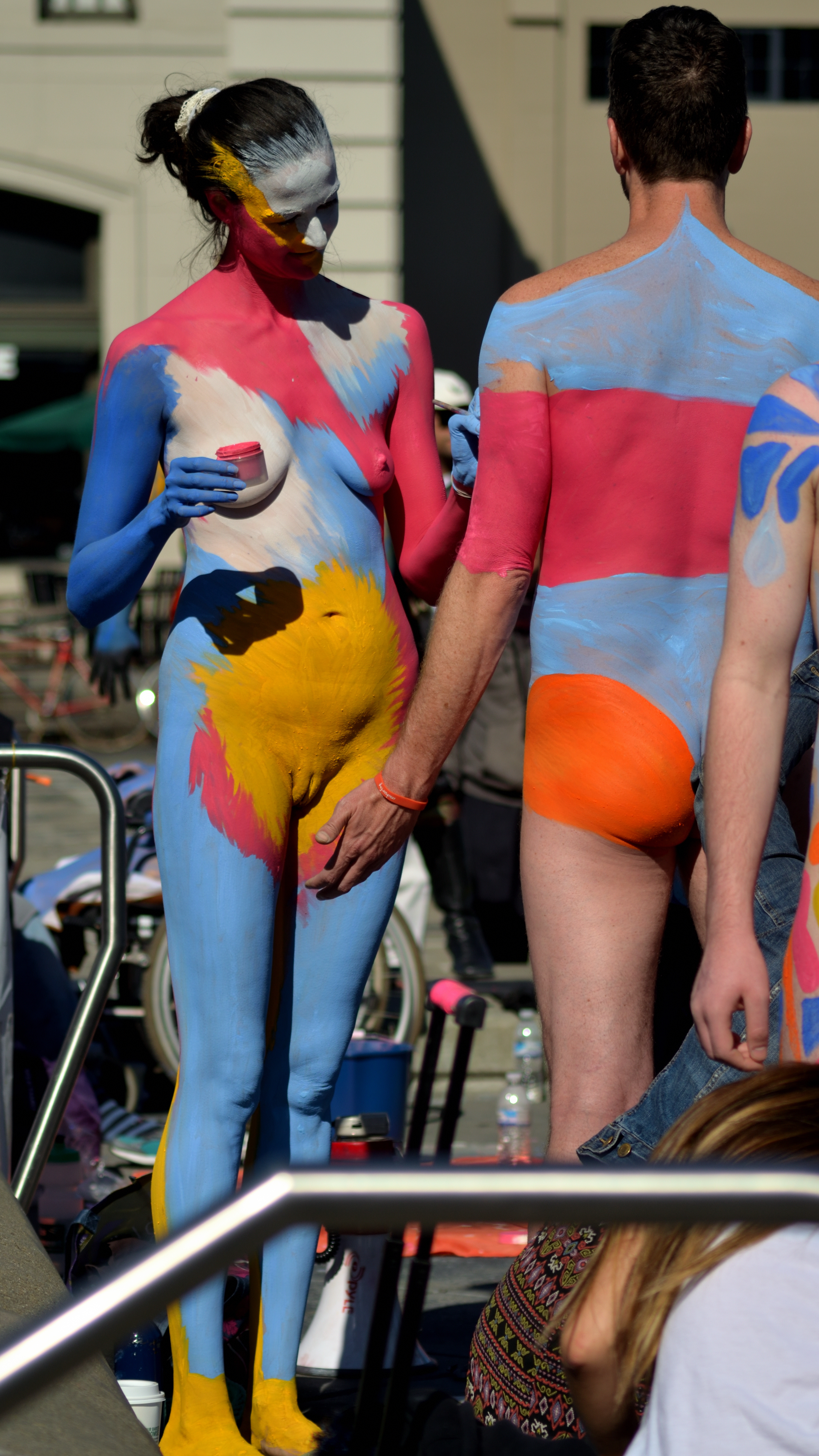 Bodypainting Day